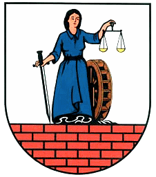 Wappen von Bobritzsch-Hilbersdorf